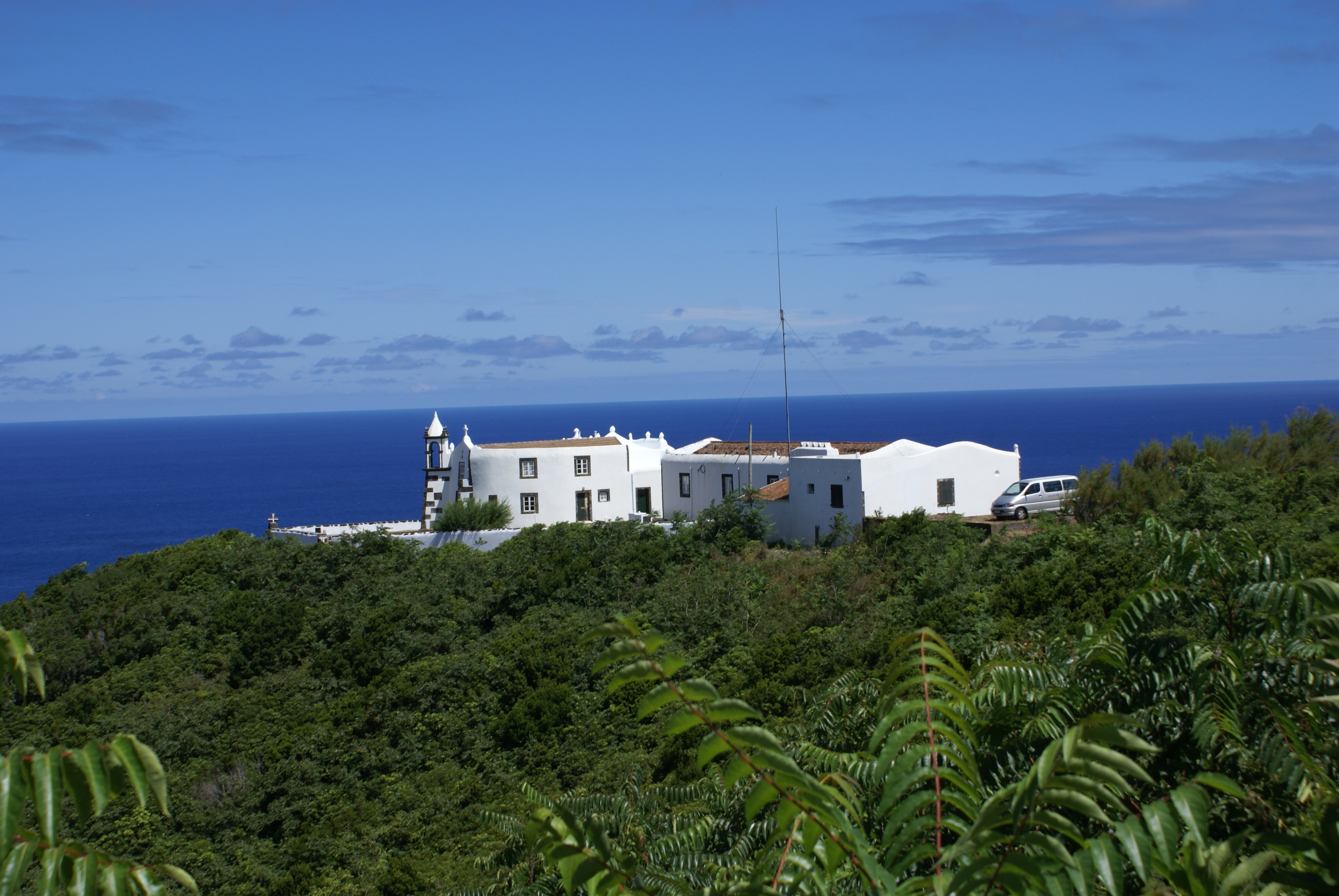 Ermida de Nossa Senhora da Ajuda, Monte da Ajuda, aspecto geral, Santa Cruz da Graciosa, ilha Graciosa, Açores, Portugal